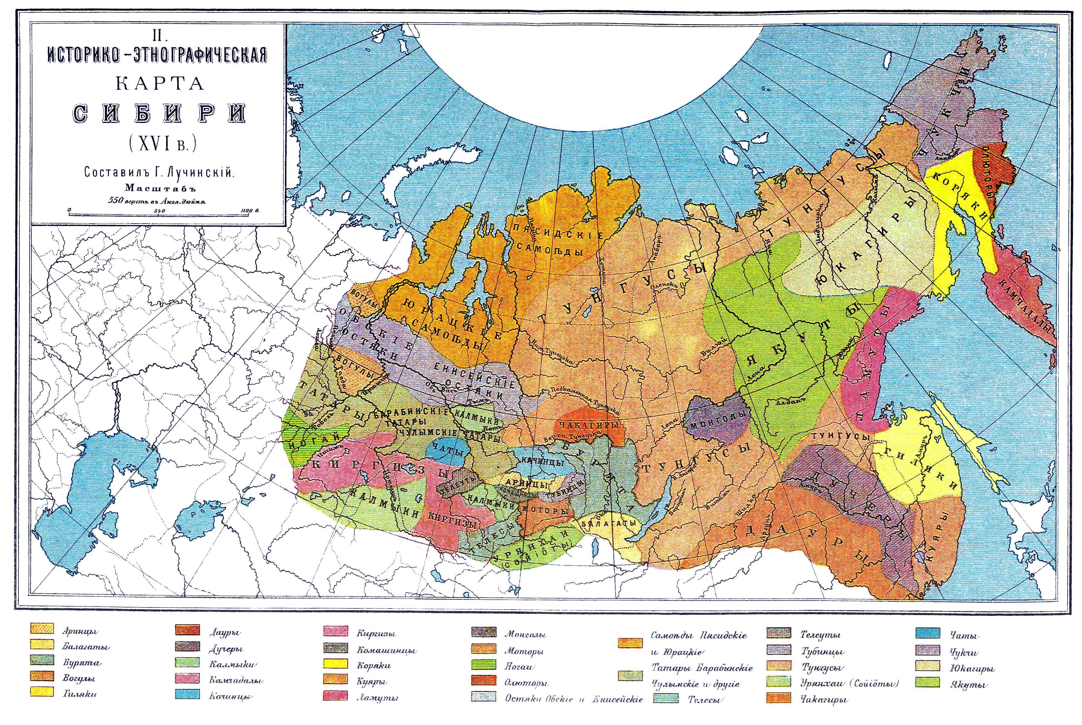 Историко-этнографическая карта Сибири XVI века. Иллюстрация из энциклопедии Брокгауза и Ефрона (дополненная)